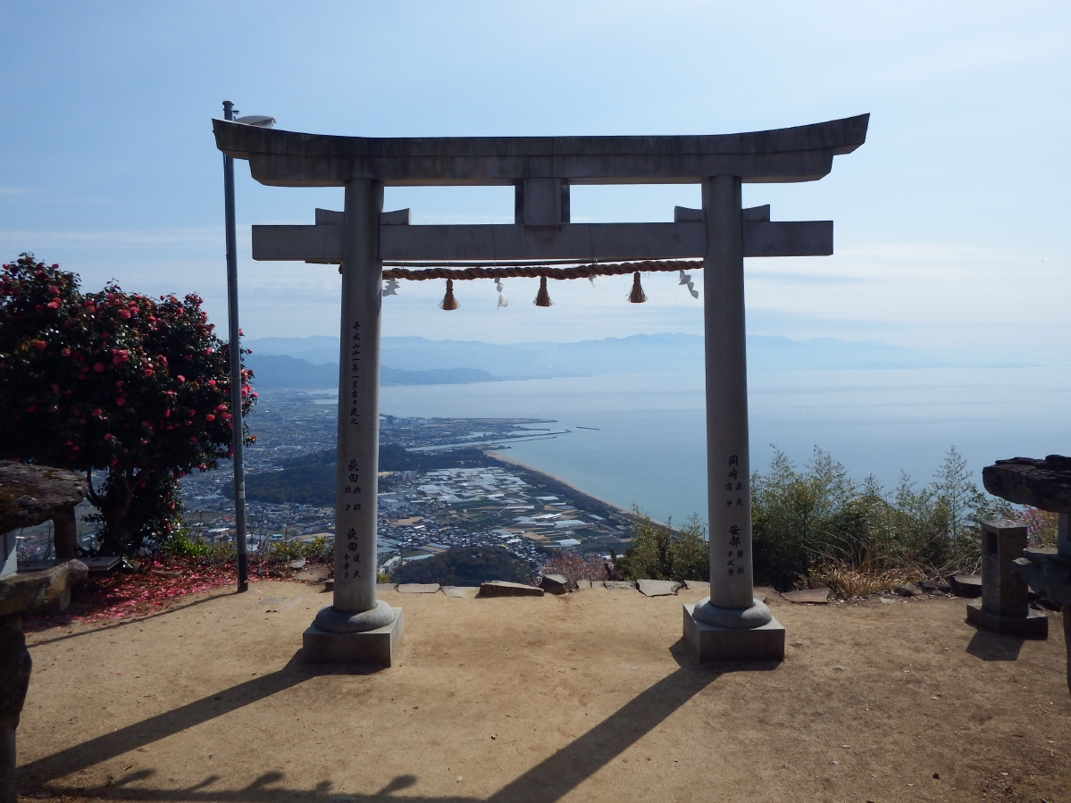 高屋神社本宮より